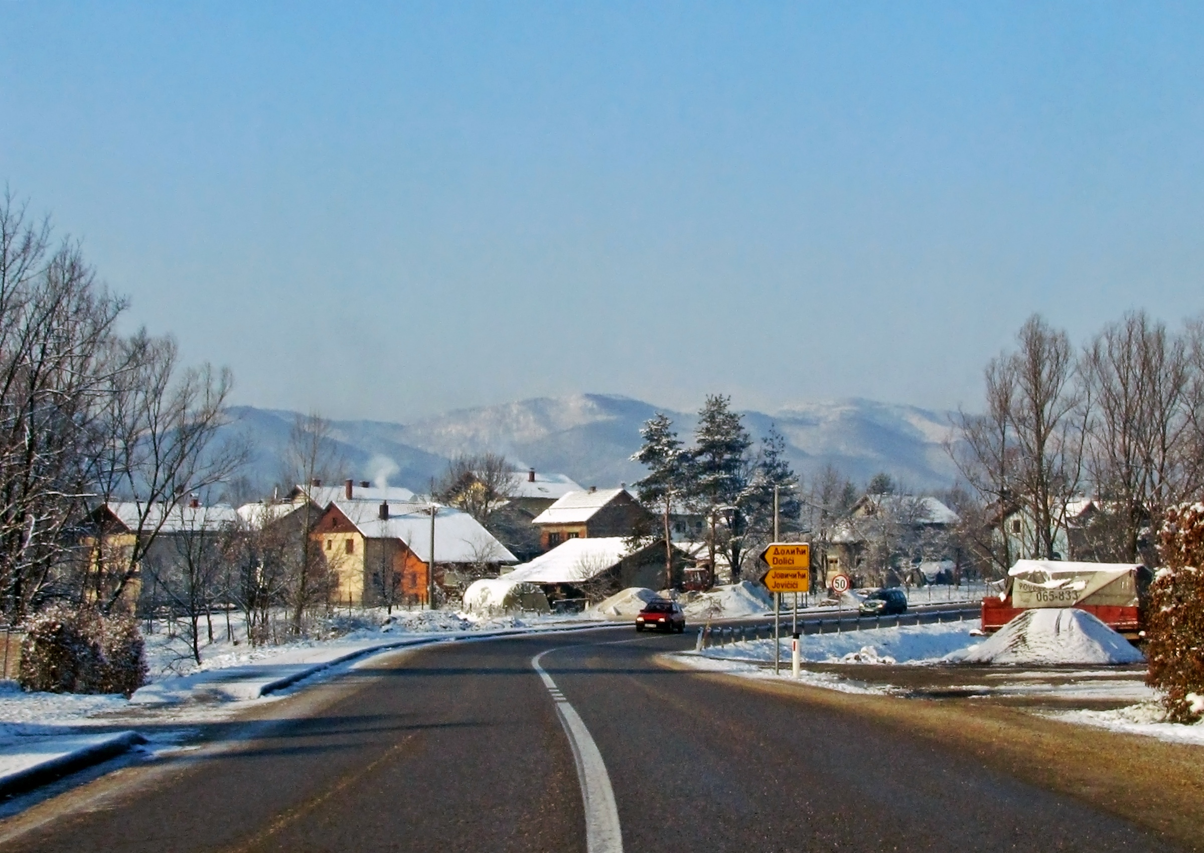 Ђулићи